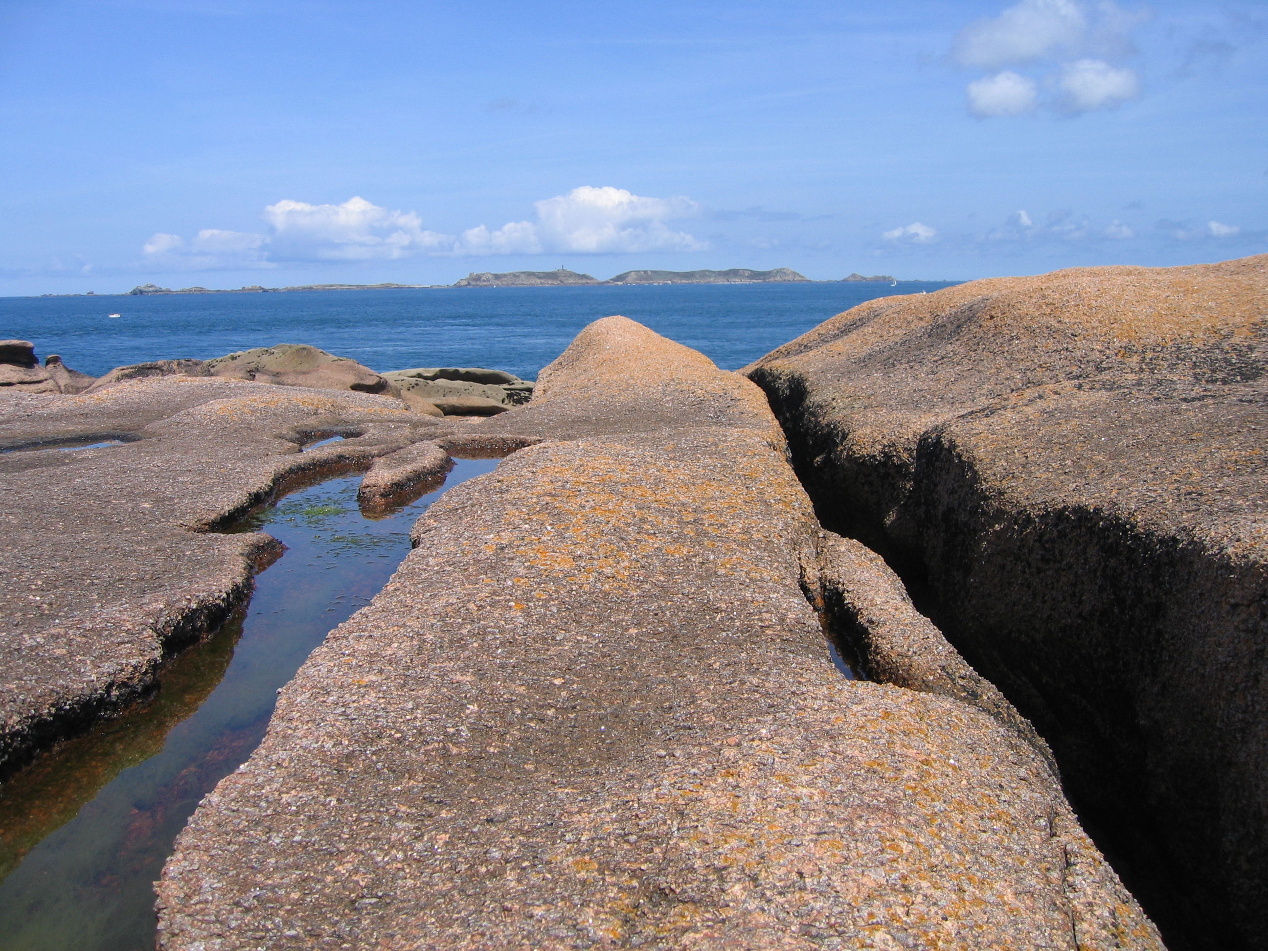 La Côte de granit rose — sur la commune de Trégastel dans les Côtes d'Armor, France